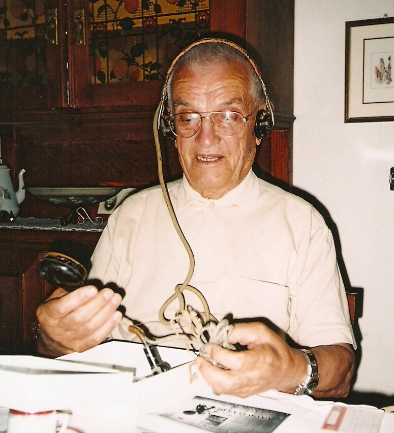 Bortigali, 2008. Quintino Ralli, radiotecnico di Radio Sardegna, indossa le cuffie con le quali, il 7 maggio 1945, intercettò la notizia della fine della guerra.